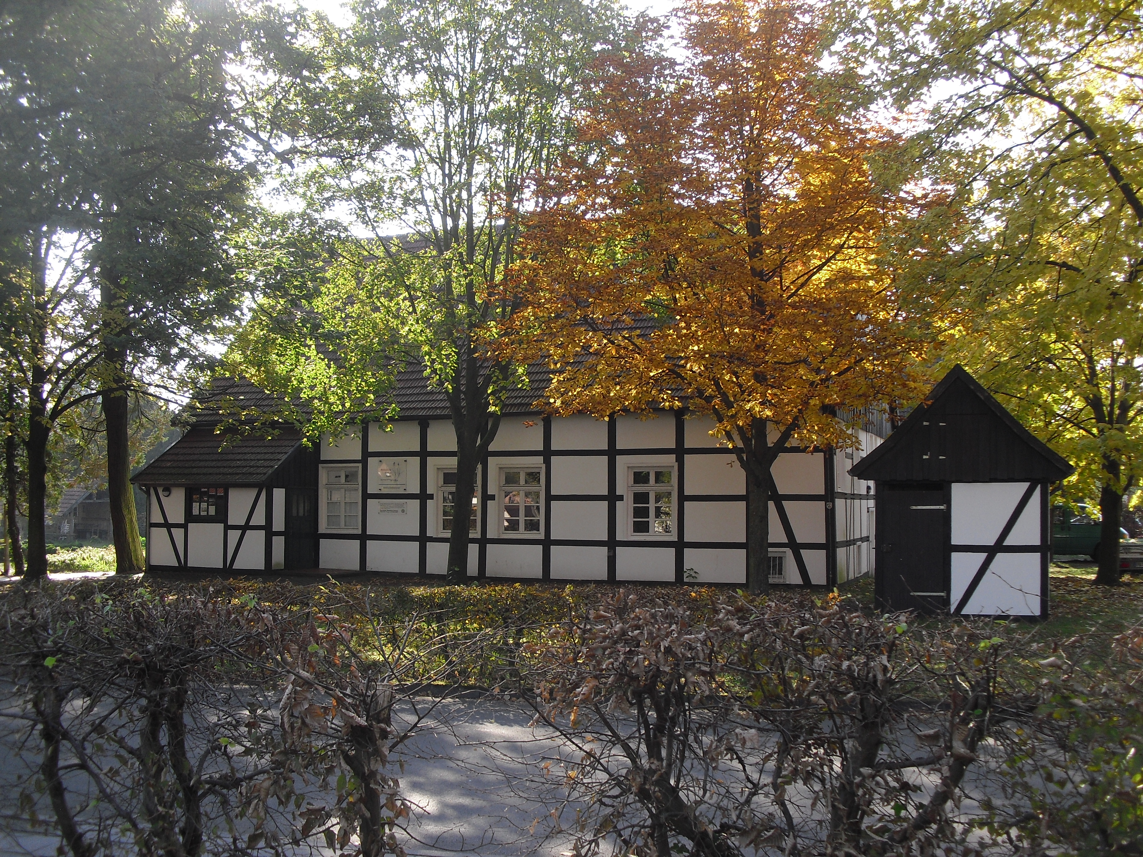 alte Schule in Riege This is a photograph of an architectural monument.